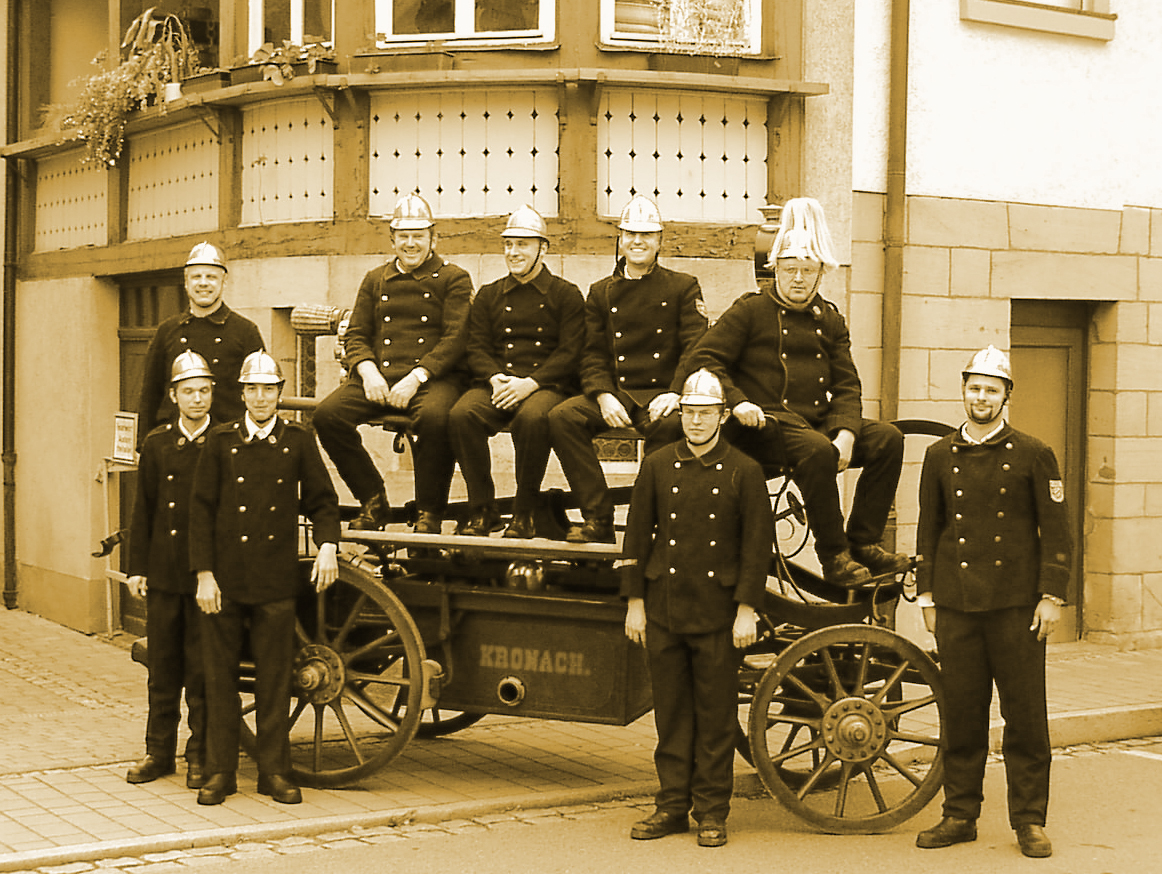 Feuerwehr Kronach mit ihrer Saug- und Druckspritze Firma Braun, Nürnberg von 1882